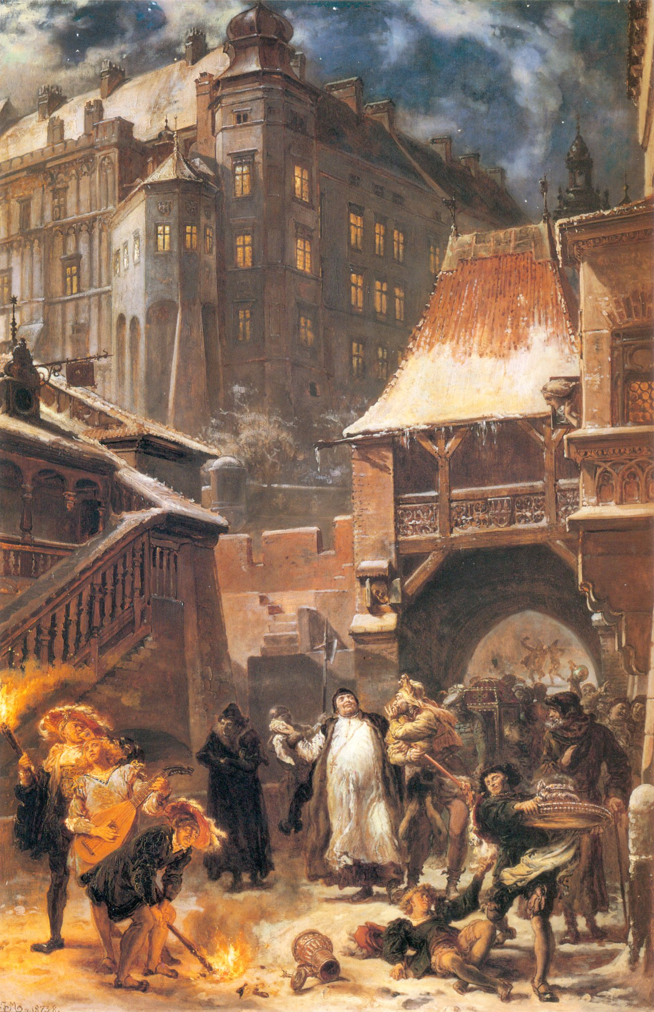 Gamrat i Stańczyk, oil on wood, 132x87.5, Kościuszko Foundation, New York